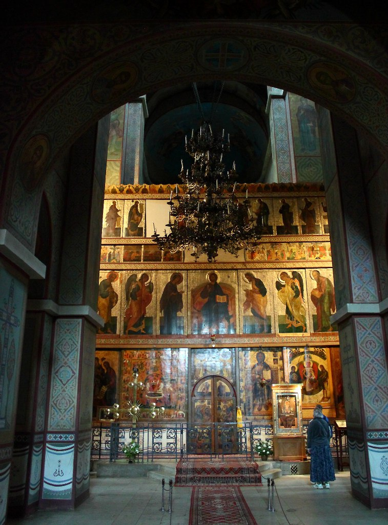 Иконостас (центральный) Софийского собора в Новогороде